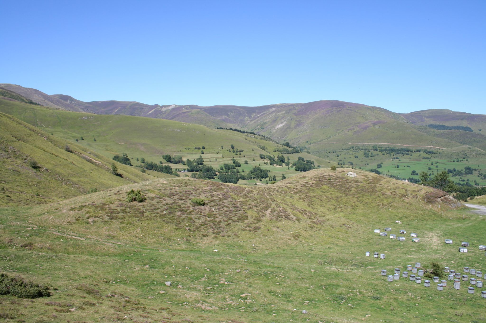 Col de Peyresourde, Pyrénées, France